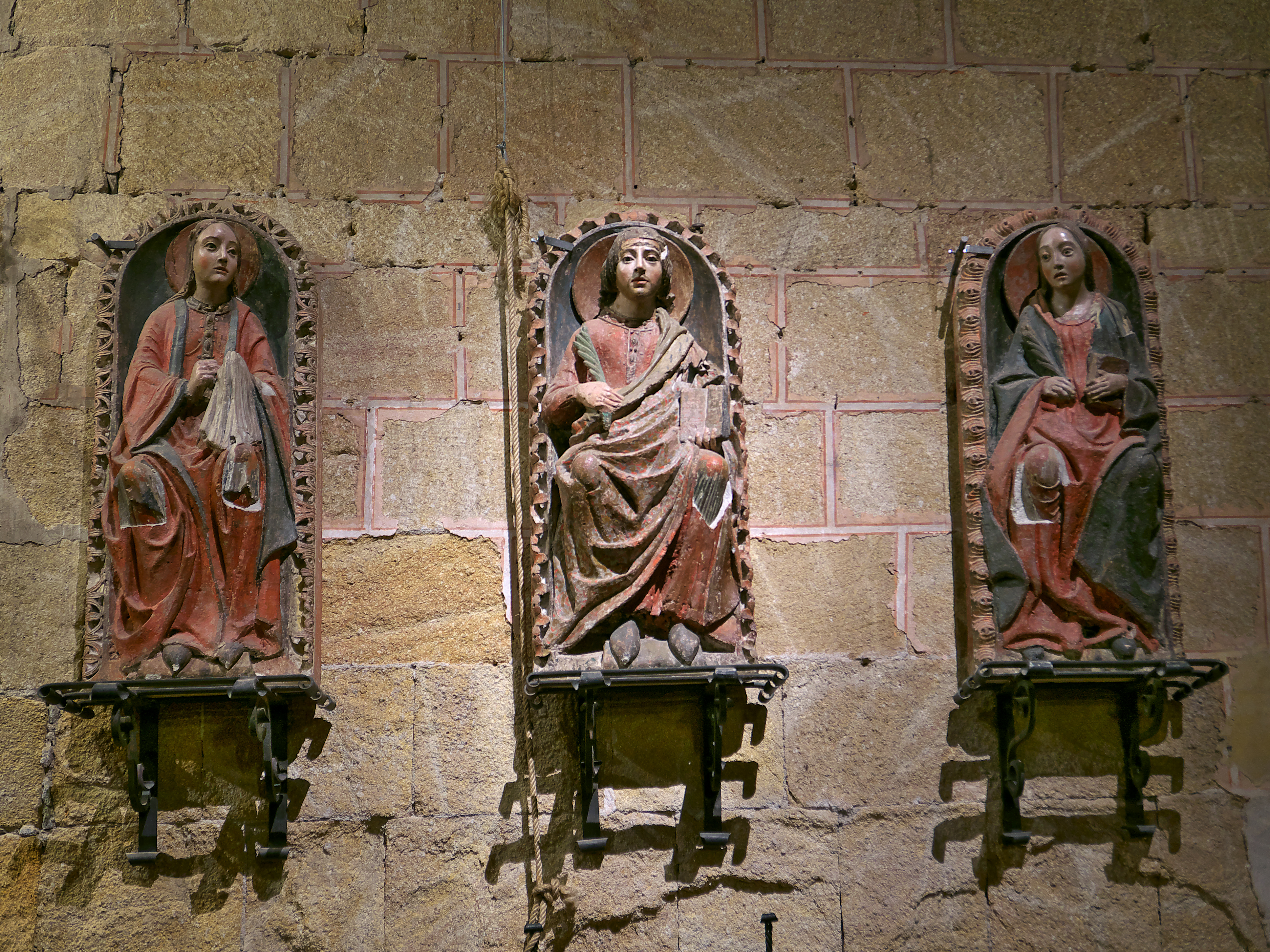 Basílica de San Vicente (Ávila). Transepto sur, esculturas sedentes de los santos mártires.